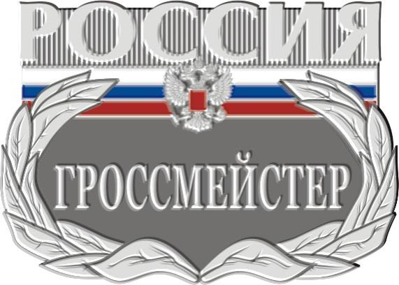 Знак к спортивному званию «Мастер спорта России международного класса»